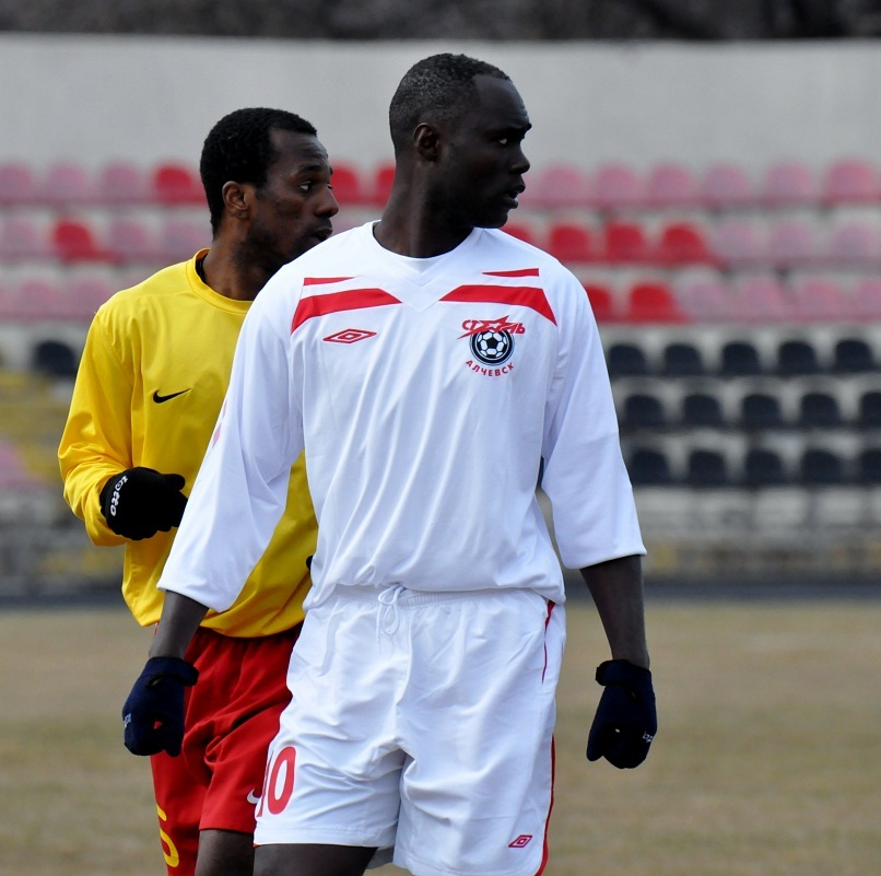 Бурнель Окана-Стази — конголезский футболист.